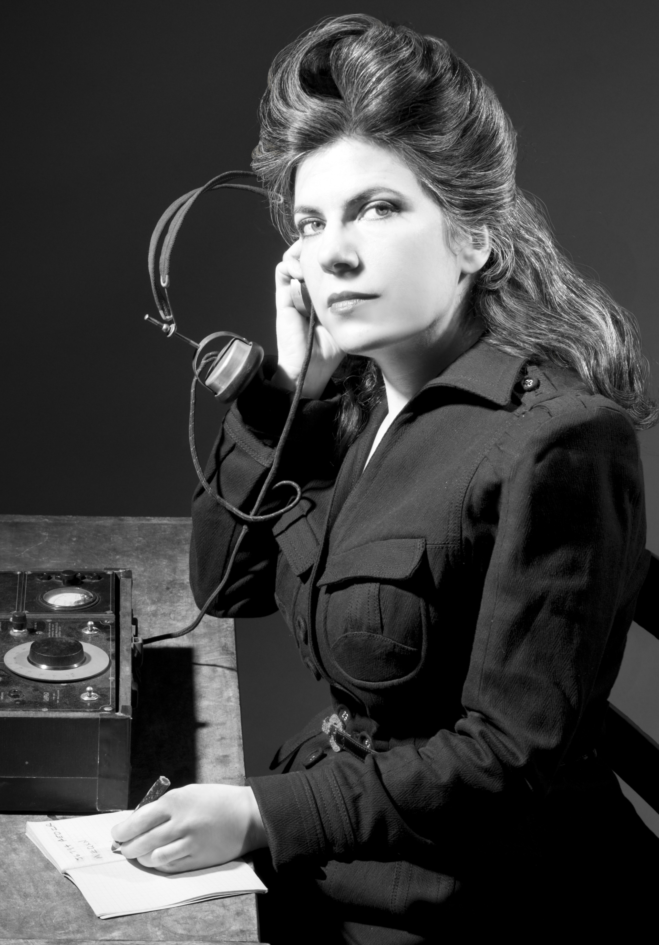 Annie Gosfield by Josh Gosfield